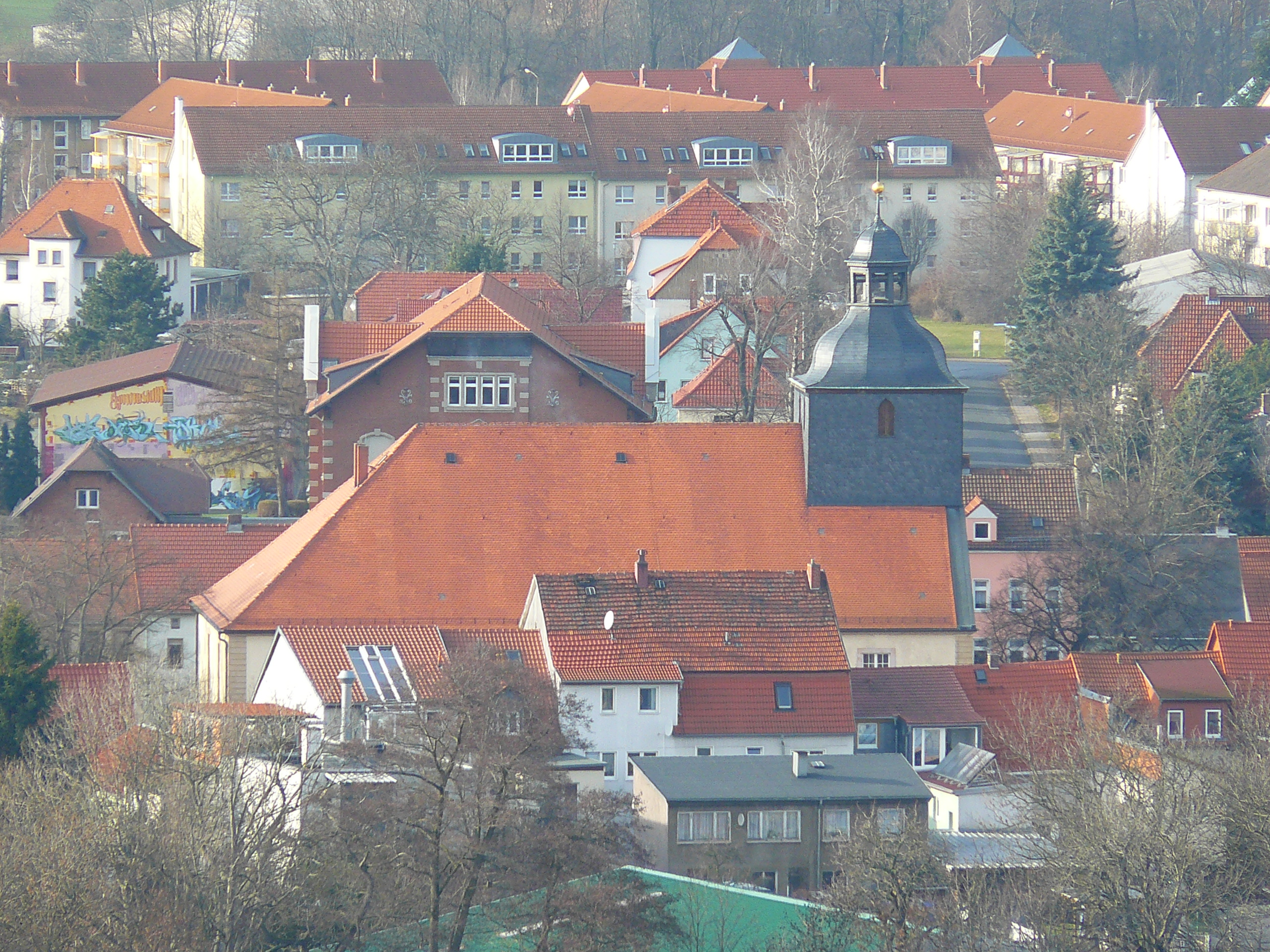 Ohrdruf, Blick vom Goldberg auf St. Trinitatis